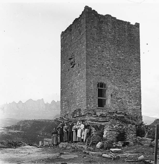 Torratxa. Josep Salvany i Blanch (1915)